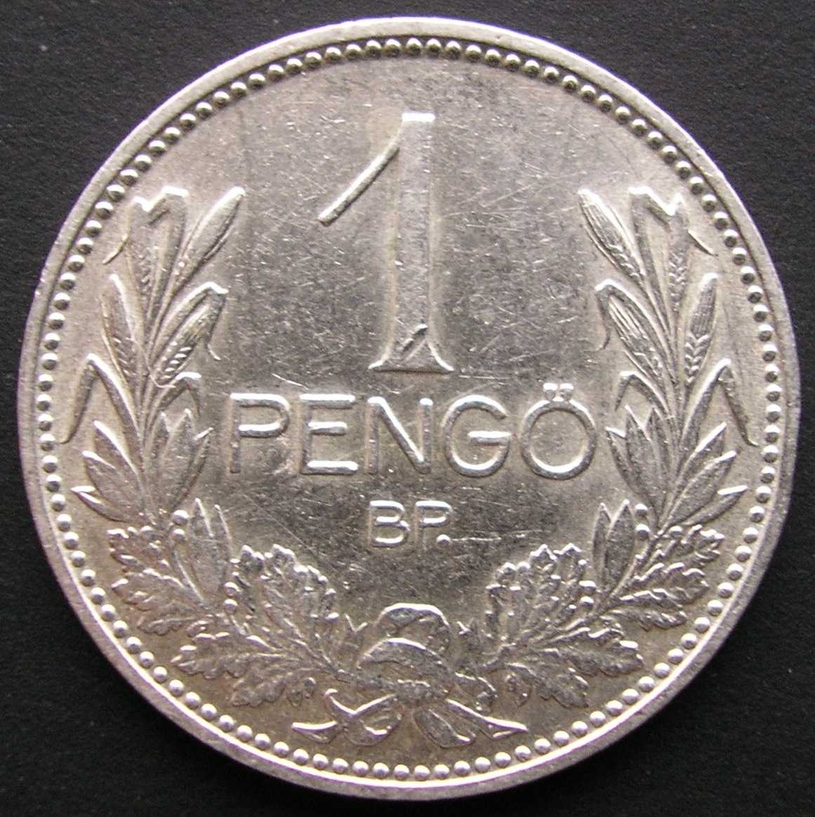 Hungary 1 Pengő 1939